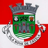 Brasão